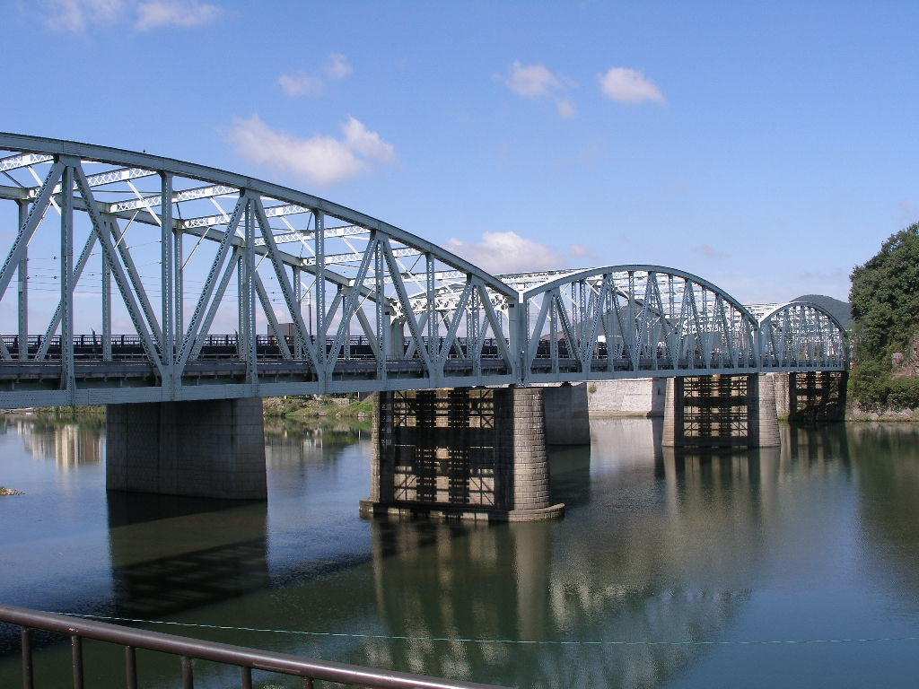 Inuyama Bridge（犬山橋）,Inuyama,Aichi(愛知県犬山市)で撮影。木曽川。